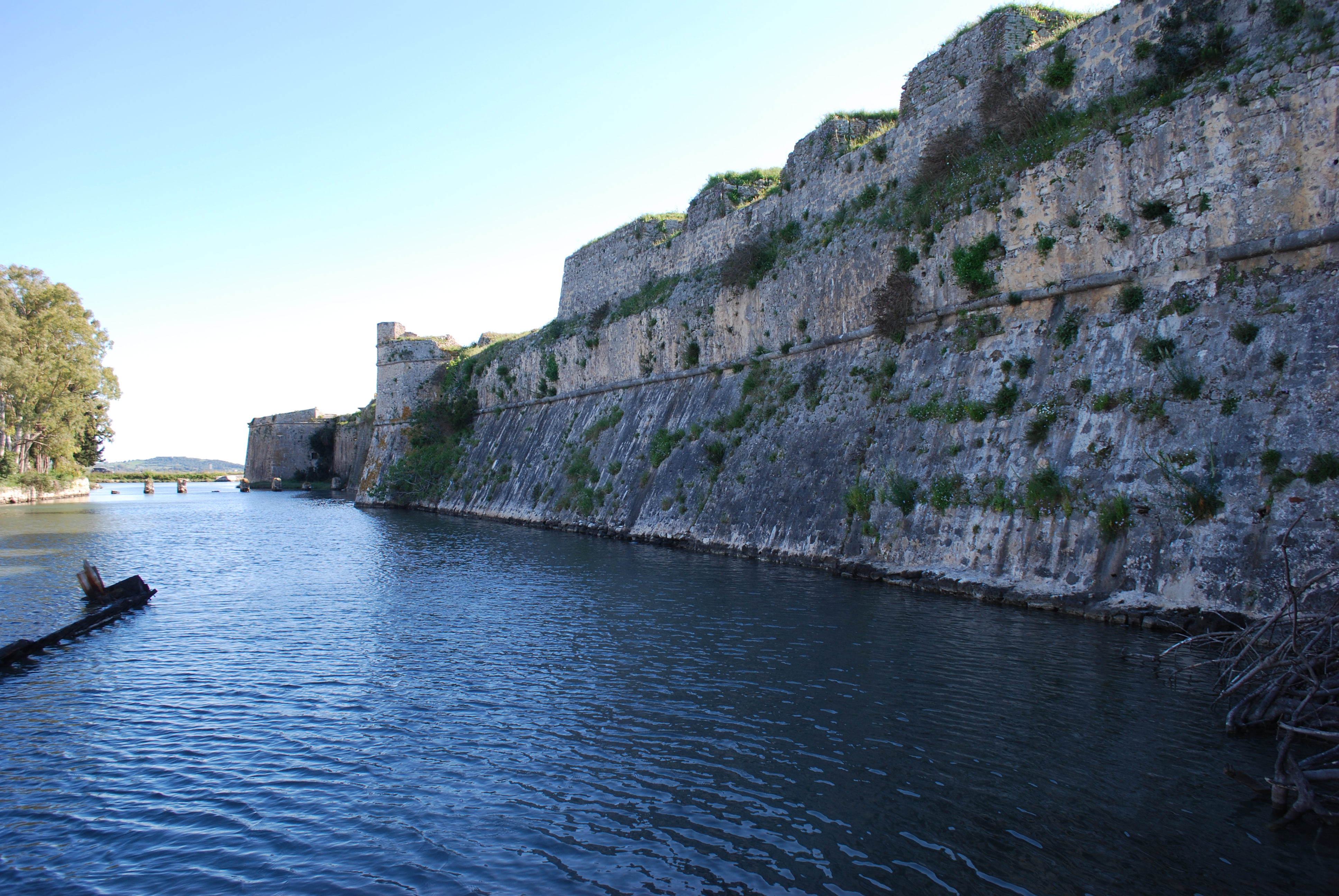 Vue de Lefkada.